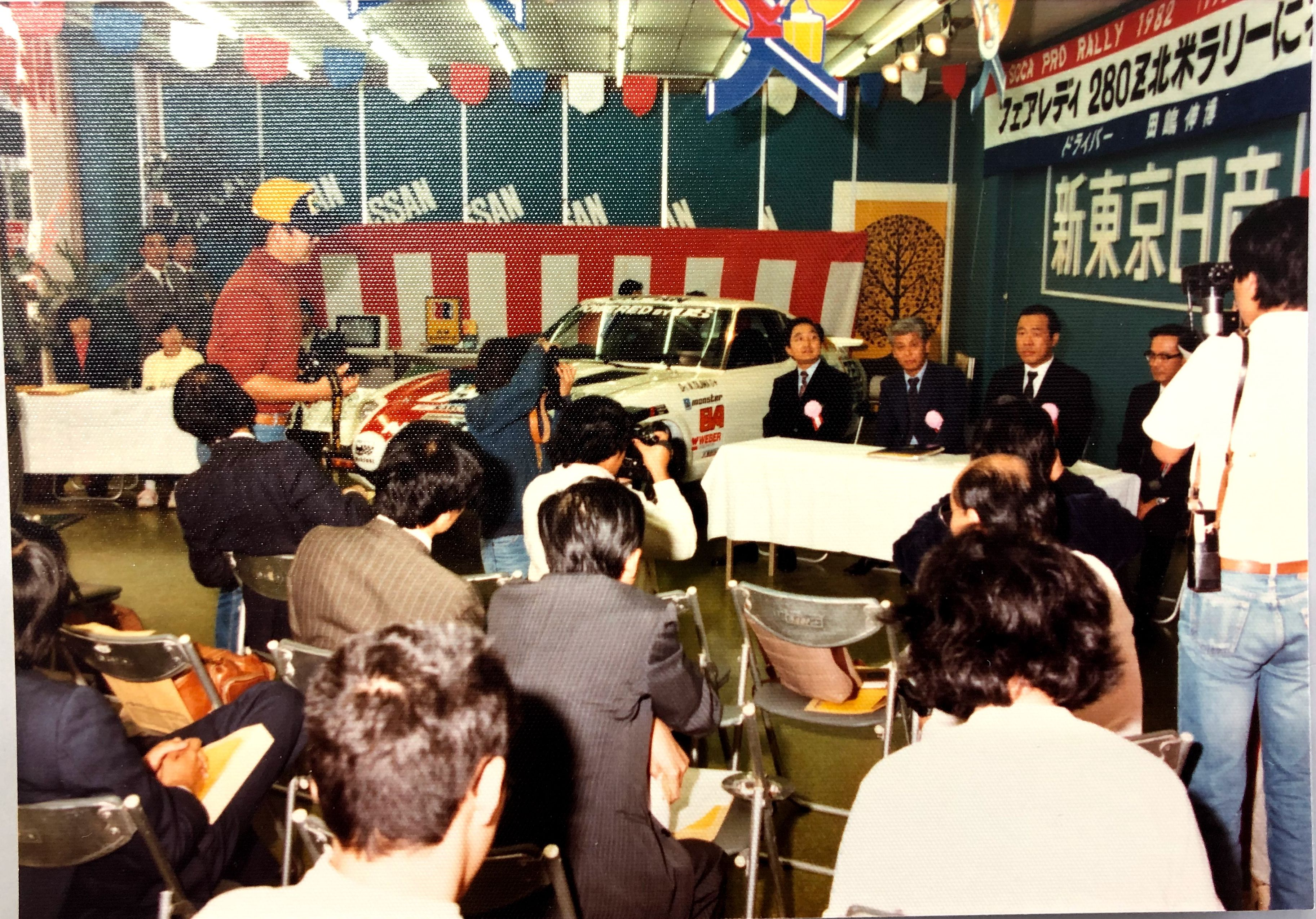 北米ラリー参戦表明会見